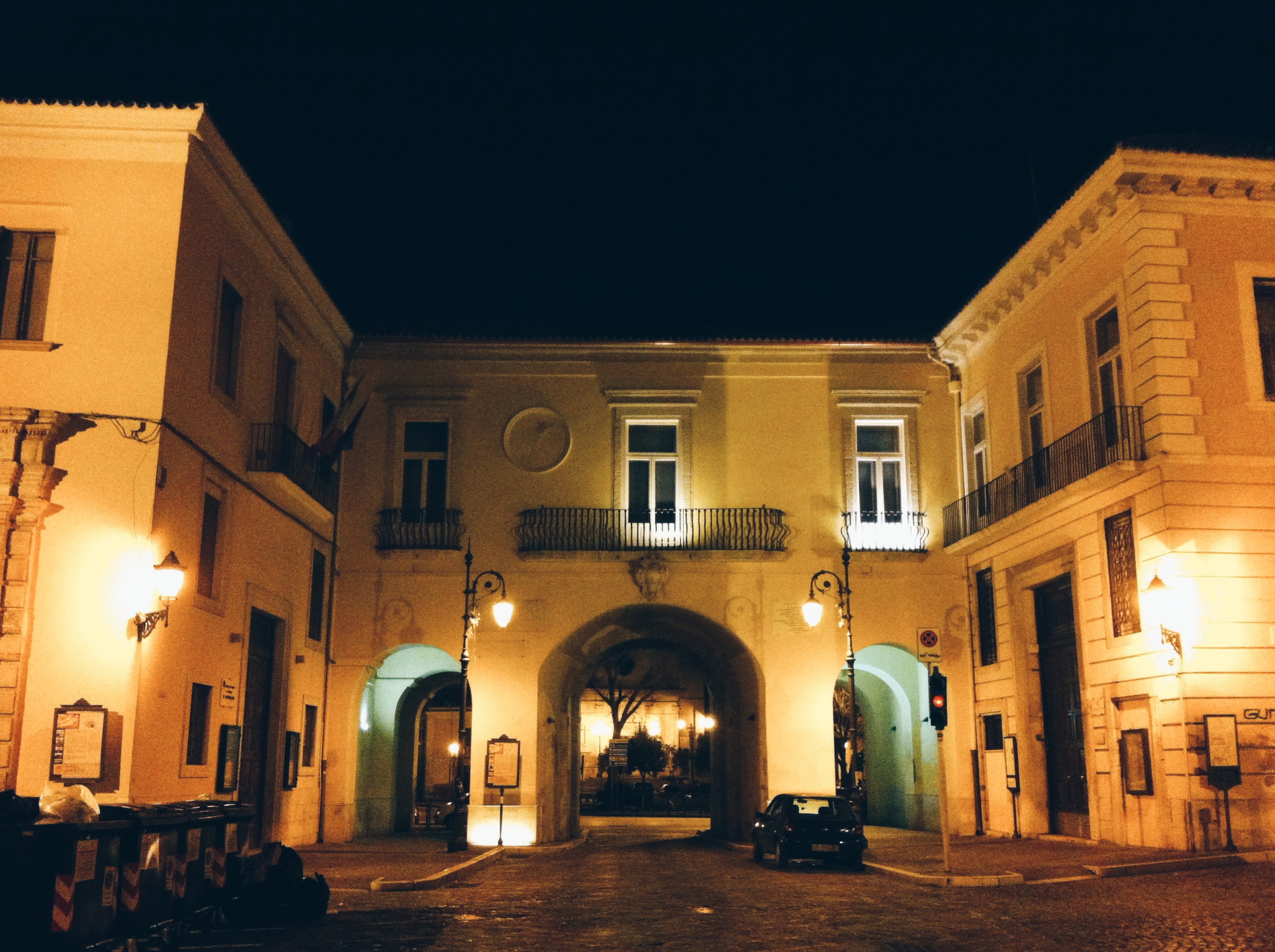 Tre Archi ,Piazza Piano delle Croci (Fg)